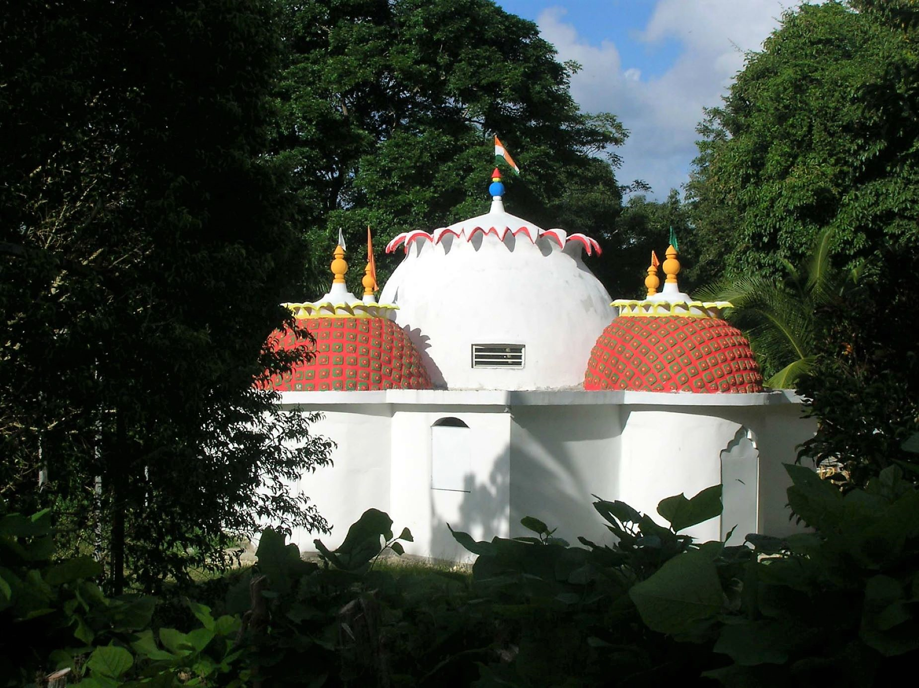 Lieu de cérémonie de la communauté indienne vivant en Grande-Terre. Place of ceremony of the Indian community living in Grande-Terre.